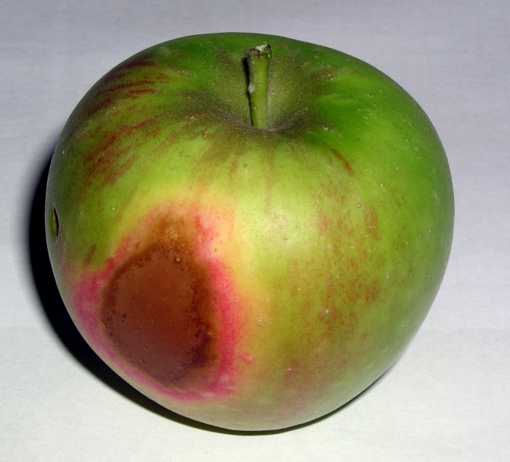 Apfel der Sorte Schöner von Boskop mit Sonnenbrand